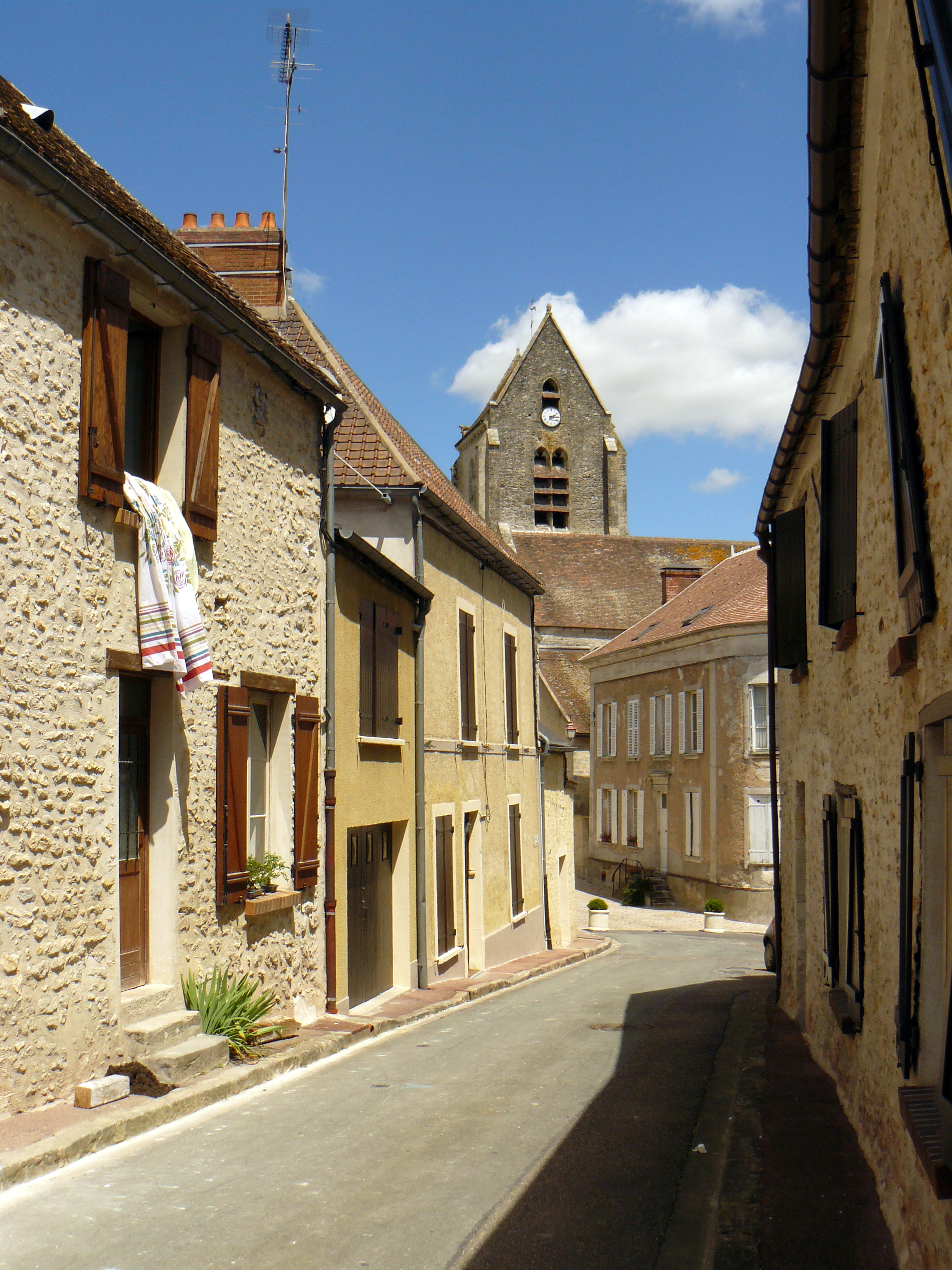 Chalo-Saint-Mars (Essonne, France) : rue de l'Eglise.